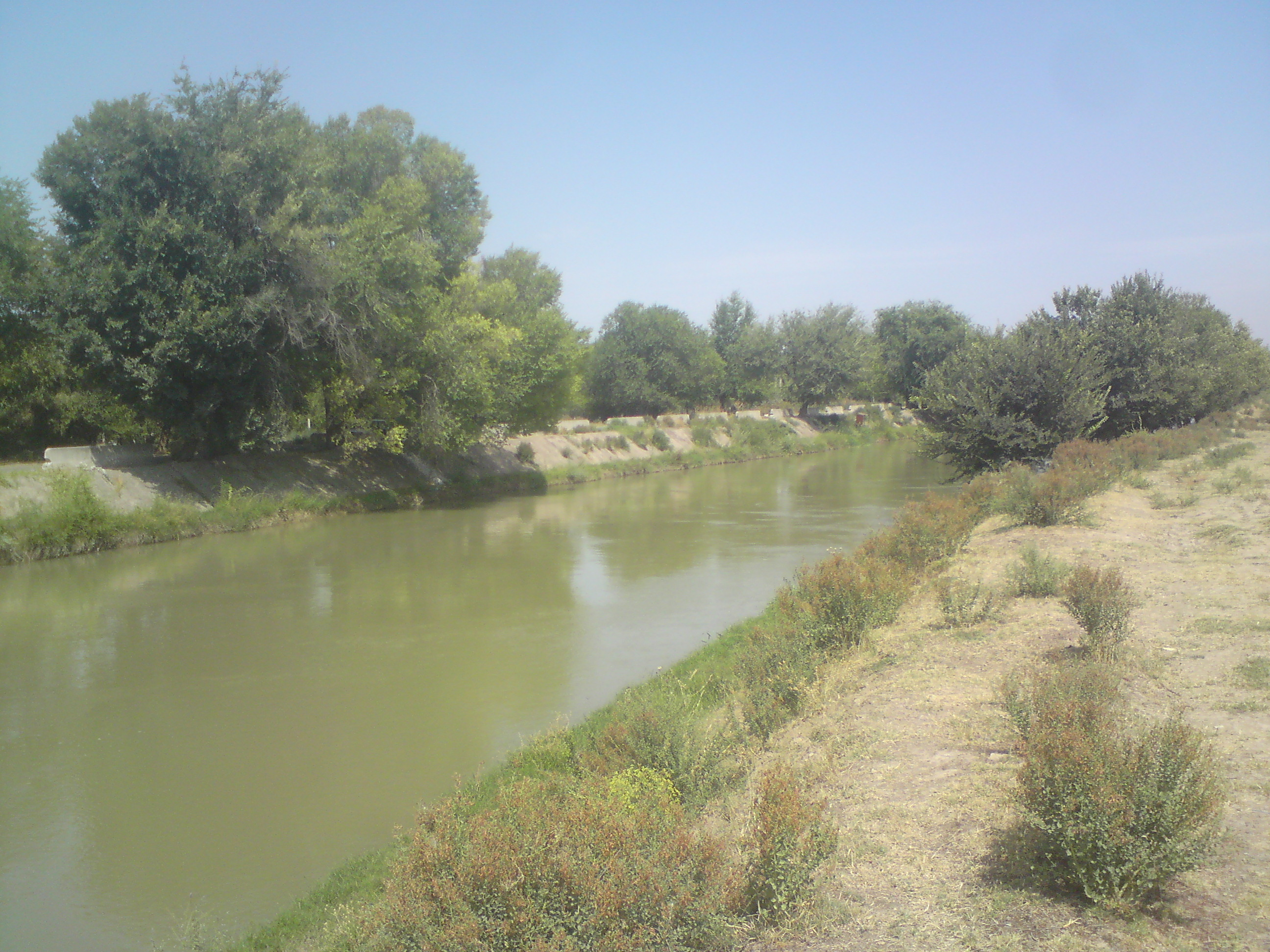 Ташкентский канал имени И.А. Палванова немного ниже отхода от Левобережного Карасу, Ташкентский вилоят